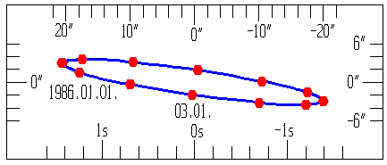 Az Aldebaran koordináta változása az évi aberráció következtében 1986. év során